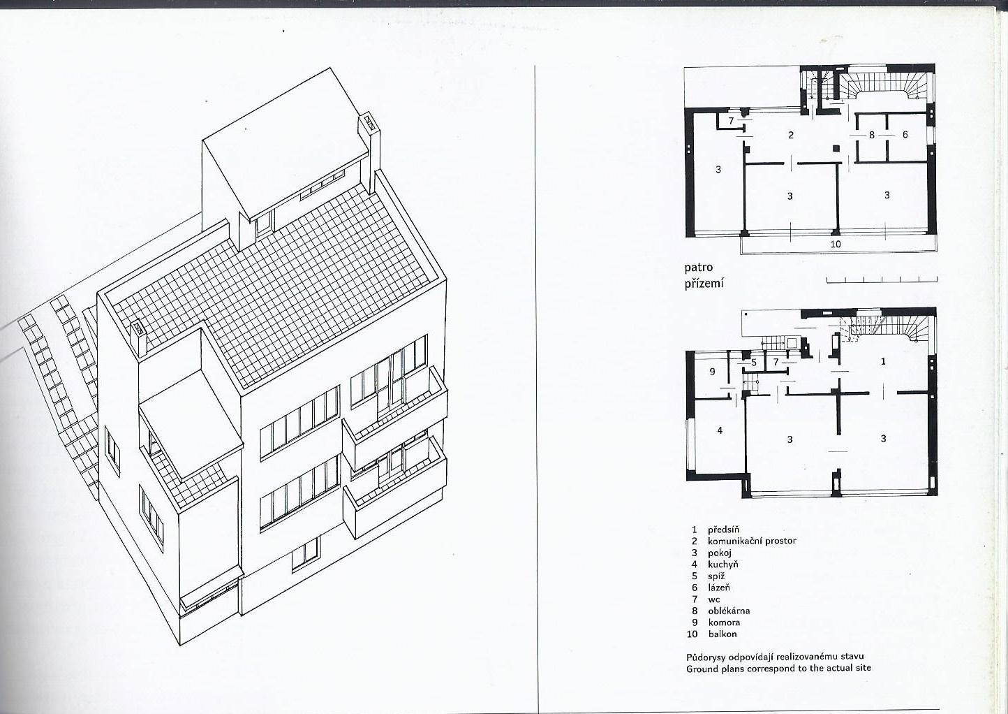 Nákres domu Na Ostrohu 41